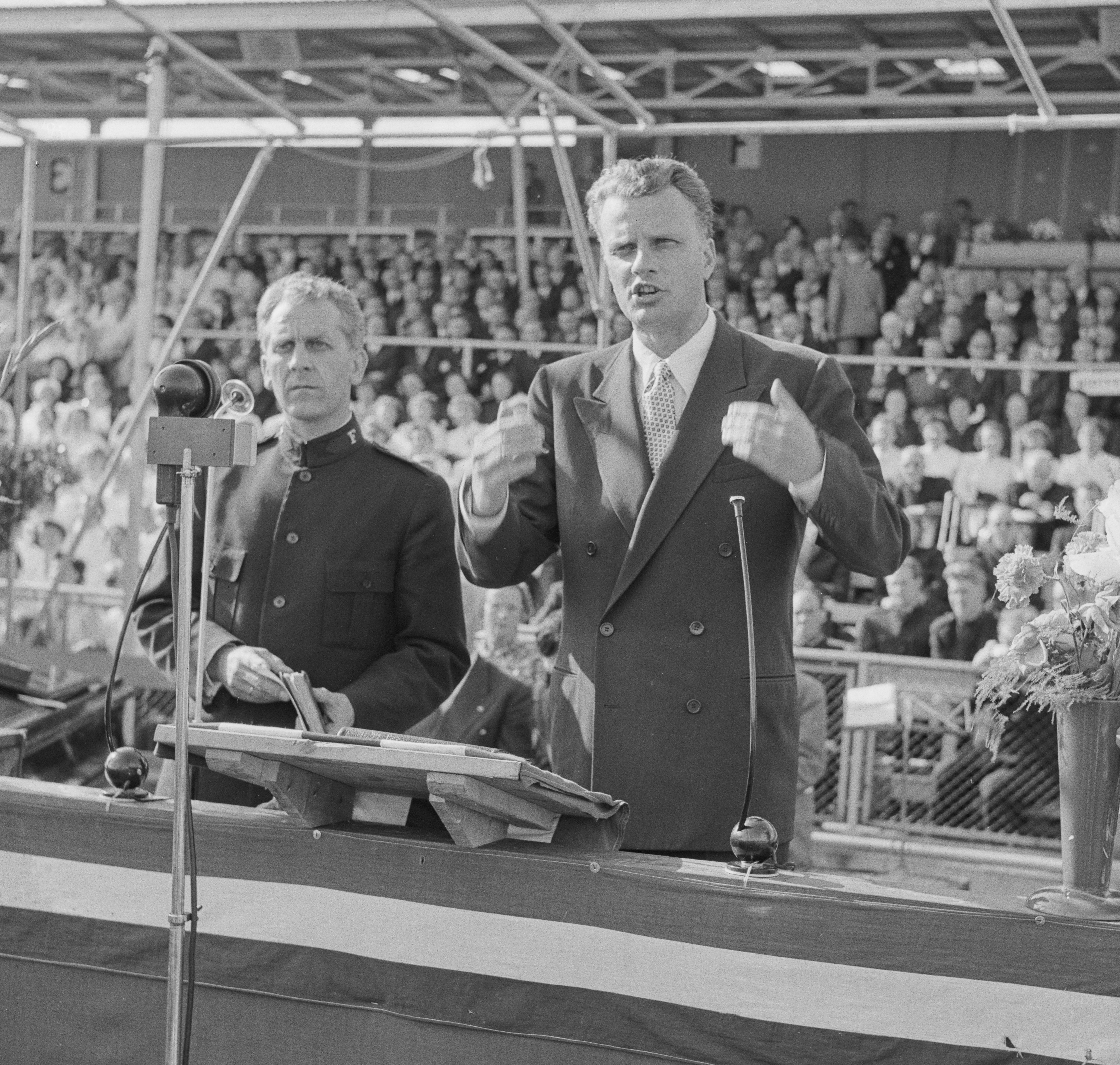 Bildet er hentet fra Arkivverket. Billy Graham Arkivinstitusjon : Riksarkivet Arkivnavn : Billedbladet NÅ Sted : Norge, Oslo, Oslo, Ullevål stadion Emneord: kristendom, forkynnelse, møter Avbildet: Graham, Billy